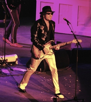 Концерт Матье Шедида в Каркассон